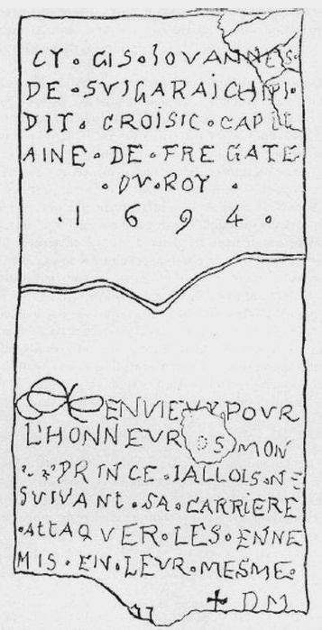 Dessin de la pierre tombale du corsaire basque Joannis de Suhigaraychipy dit Coursic, tué à Terre-Neuve en 1694 et enterré à Plaisance.